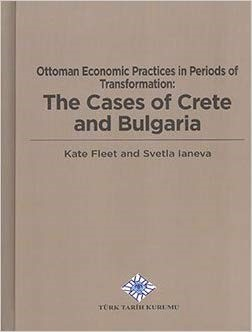 Корица на книга